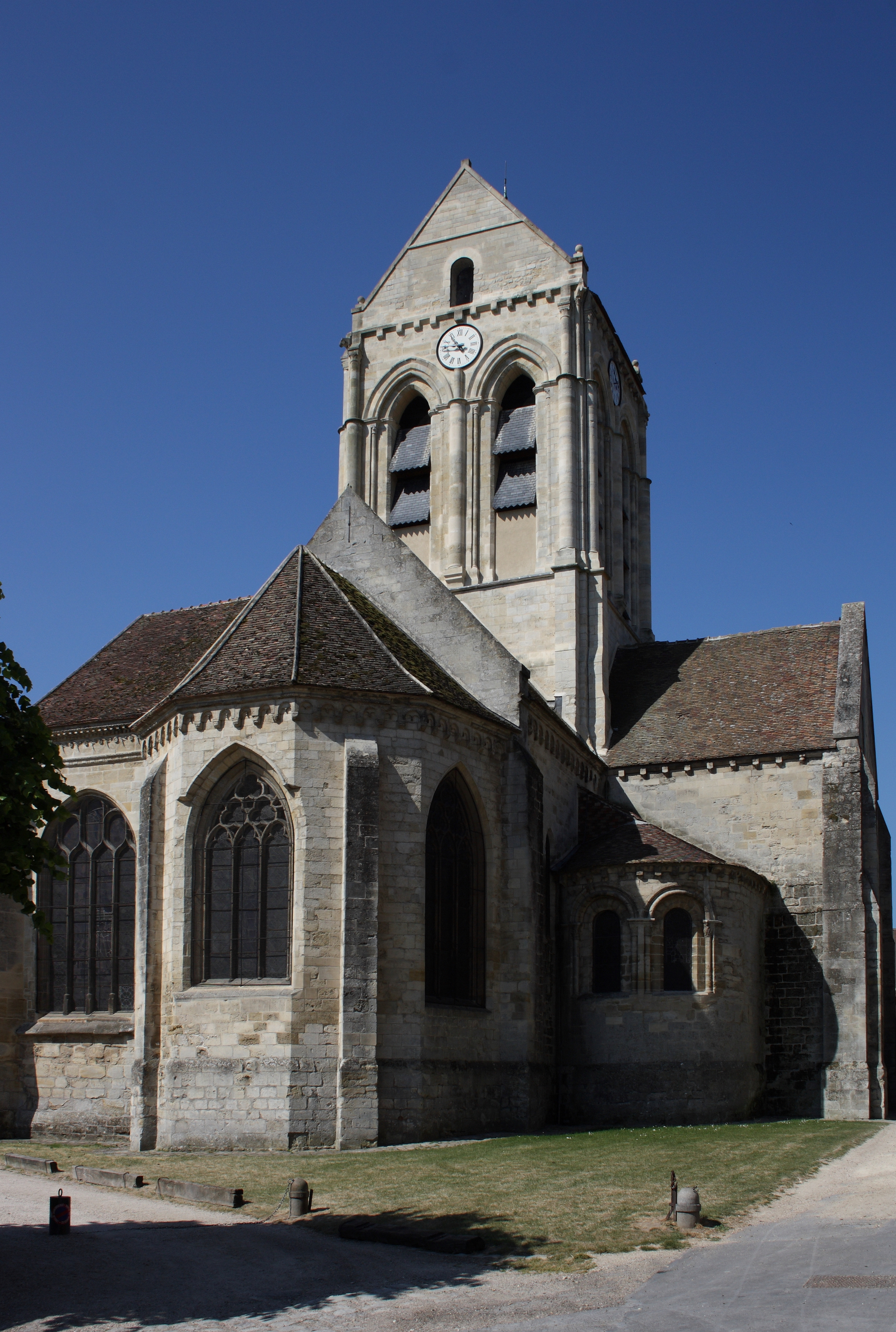 Katholische Pfarrkirche Notre-Dame-de-l'Assomption in Auvers-sur-Oise im Département Val d'Oise (Île de France), erbaut im 12./13. Jahrhundert, Ansicht von Osten